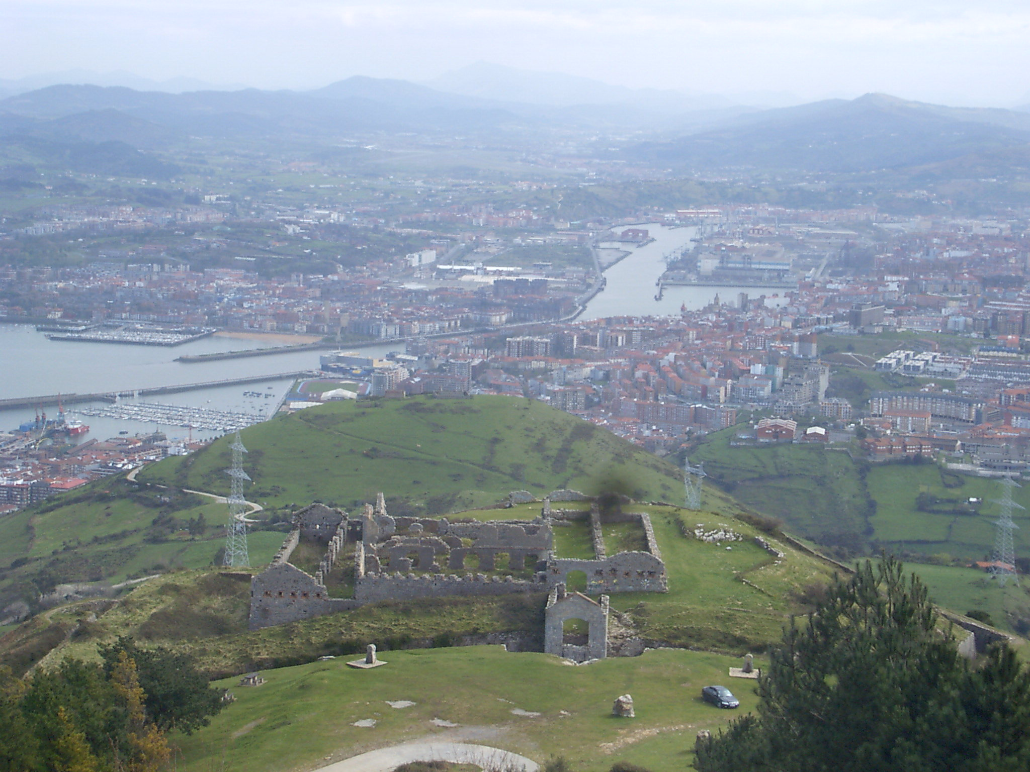 Serantes mendiaren tontorretik ikuspegia. Bilboko itsasadarra